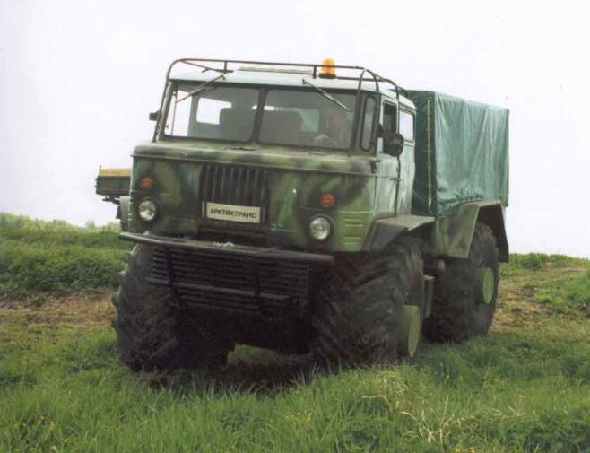 Мамонтёнок — плавающий грузовой вездеход с шарнирно-сочлененной рамой на шинах сверхнизкого давления.